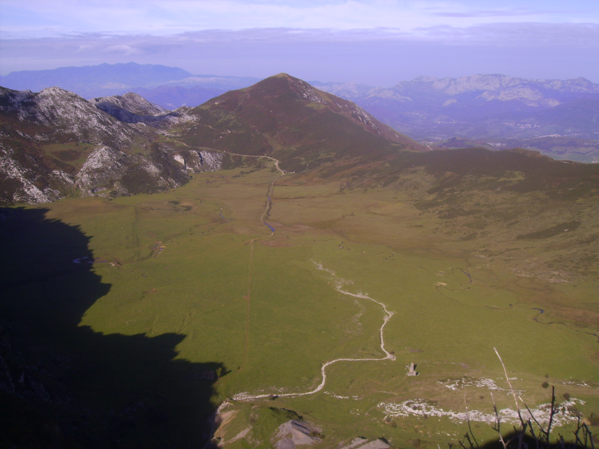 Fotografía del Poljé de Comellas tomada desde la ruta del Lago Enol, en los Picos de Europa, España